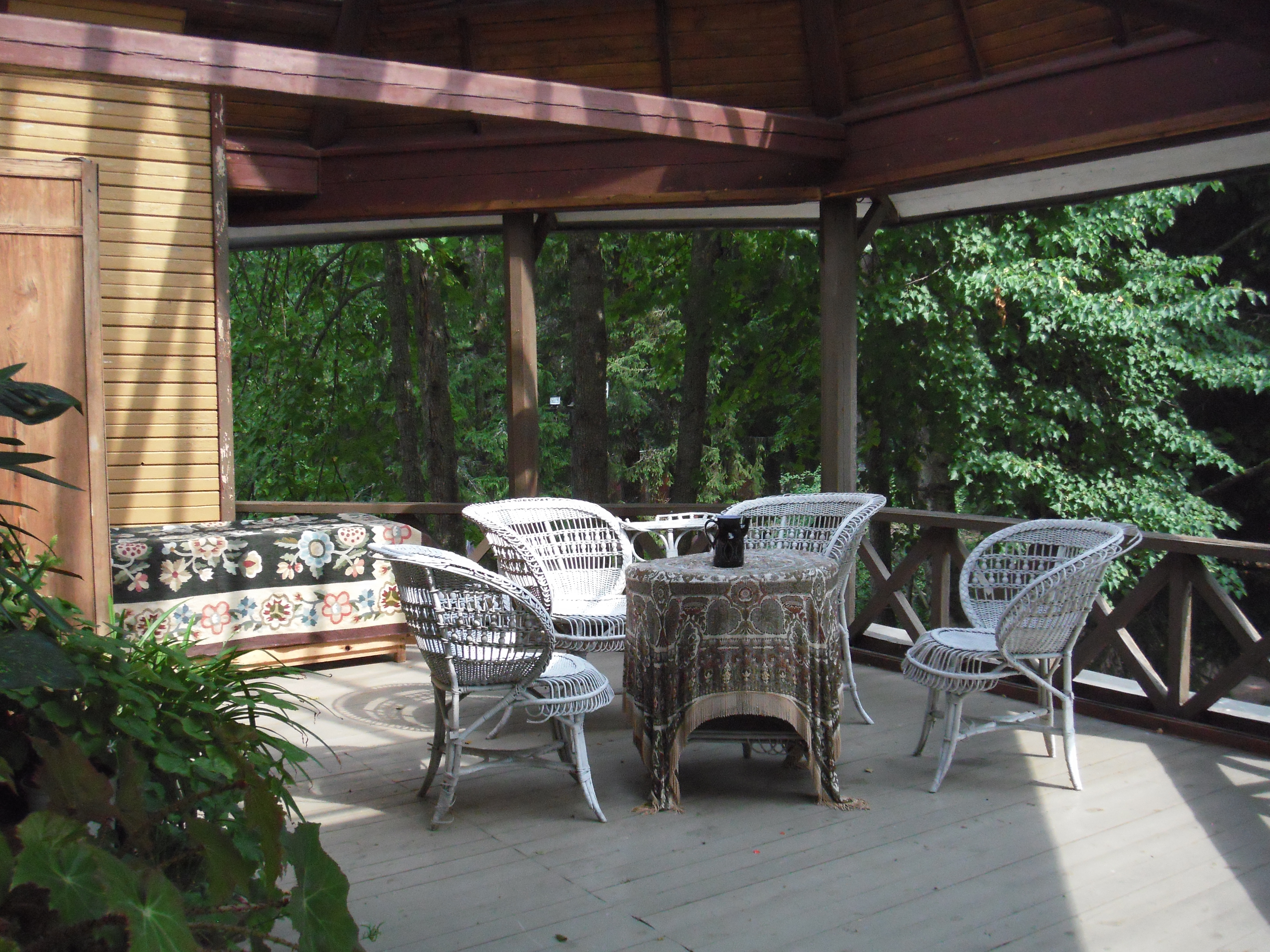 Усадьба "Пенаты" в п.Репино СПб. Интерьеры